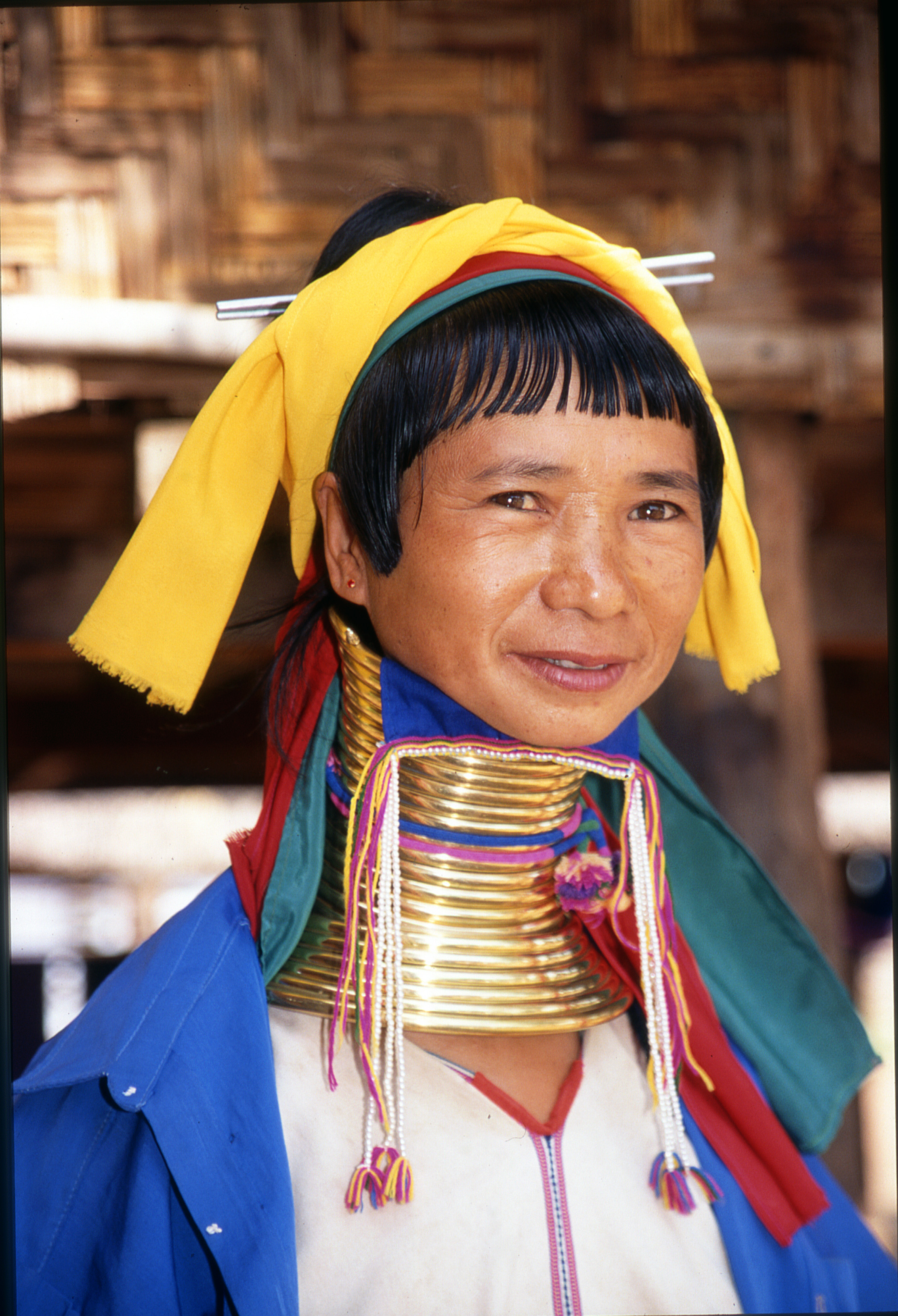 Birmanie femme de l'éthnie Karen